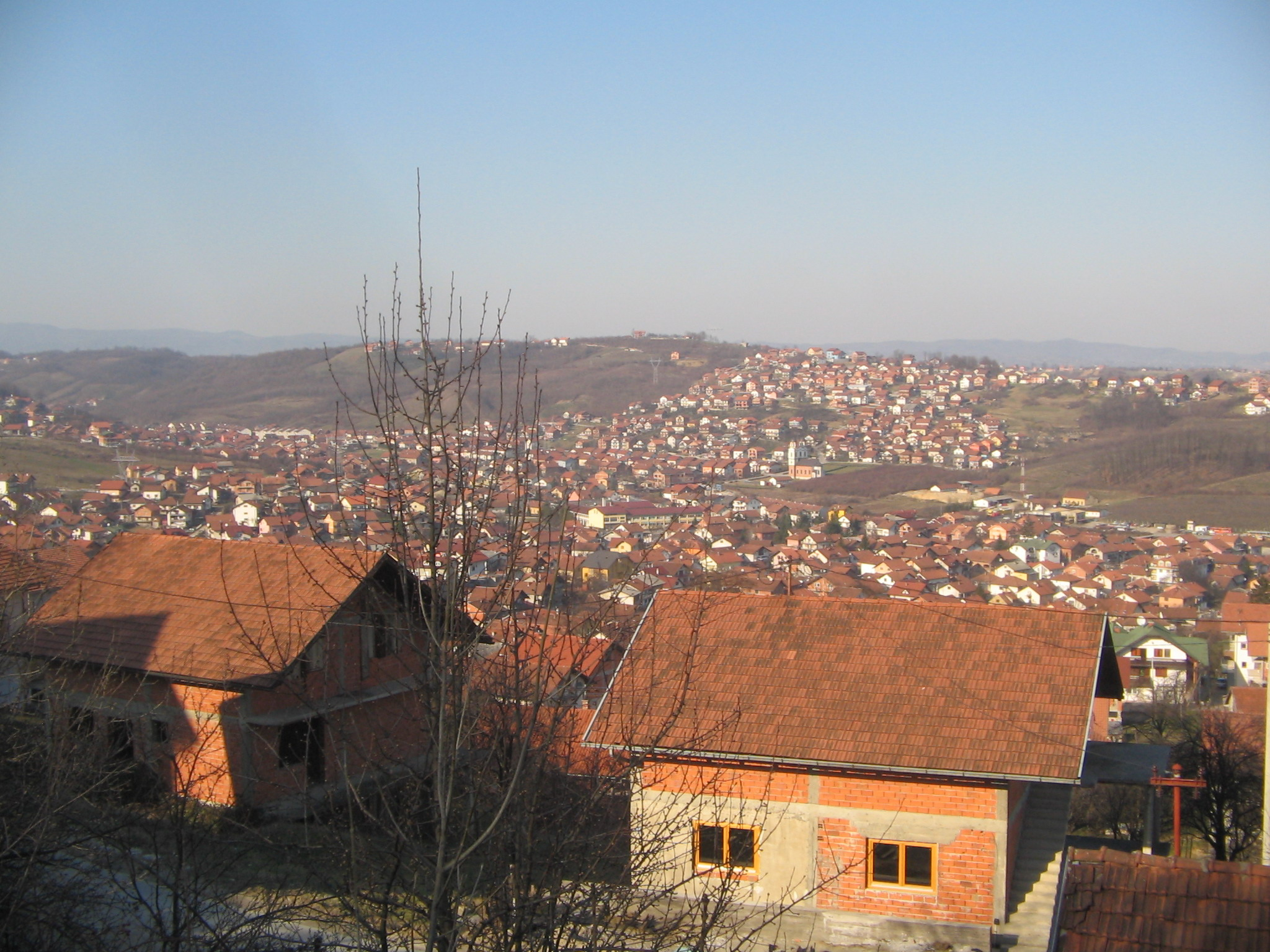 Лауш (Бања Лука)